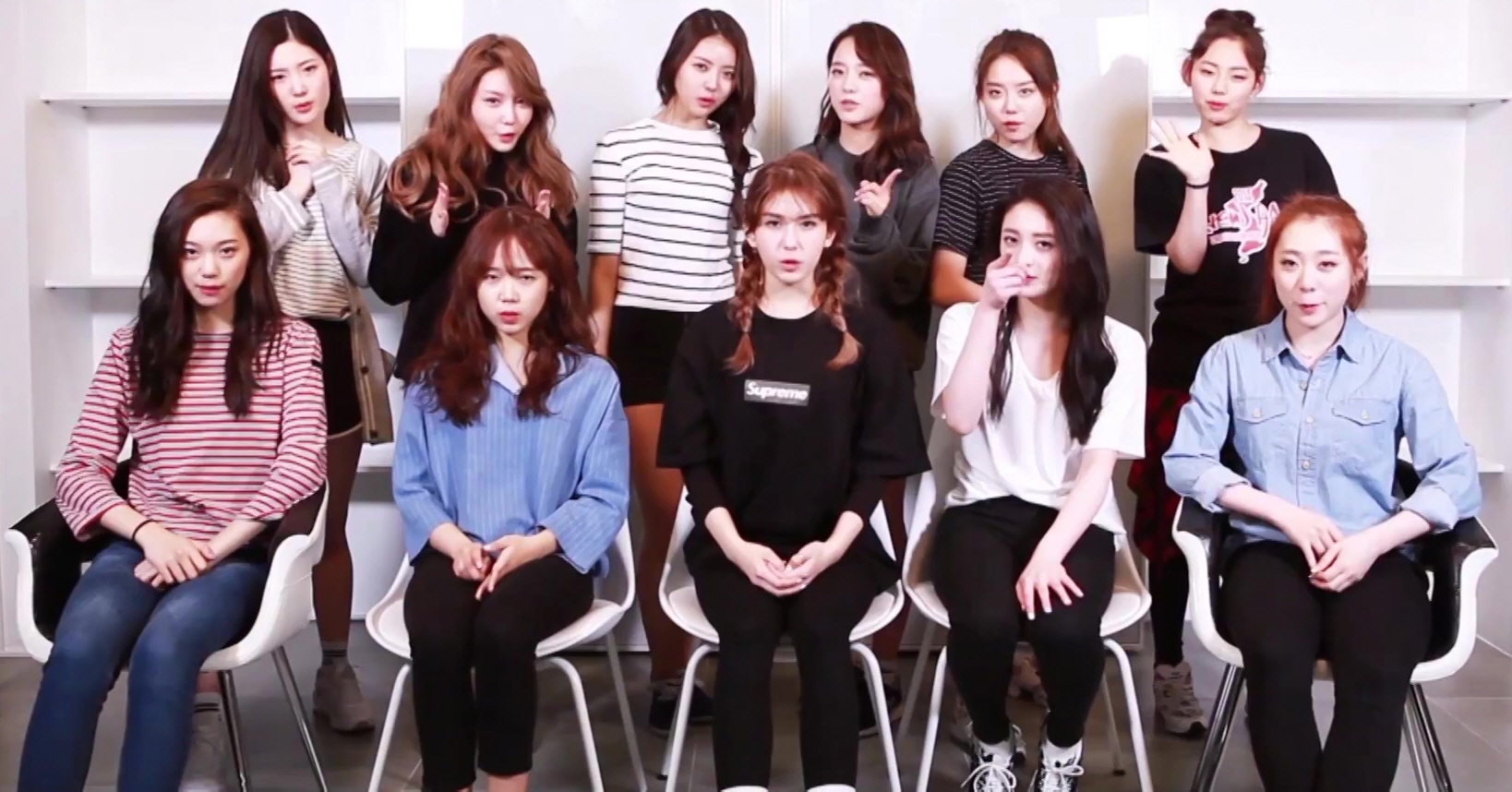 아이오아이 (I.O.I)와 함께하는 백발백중 챌린지 특별초청전!